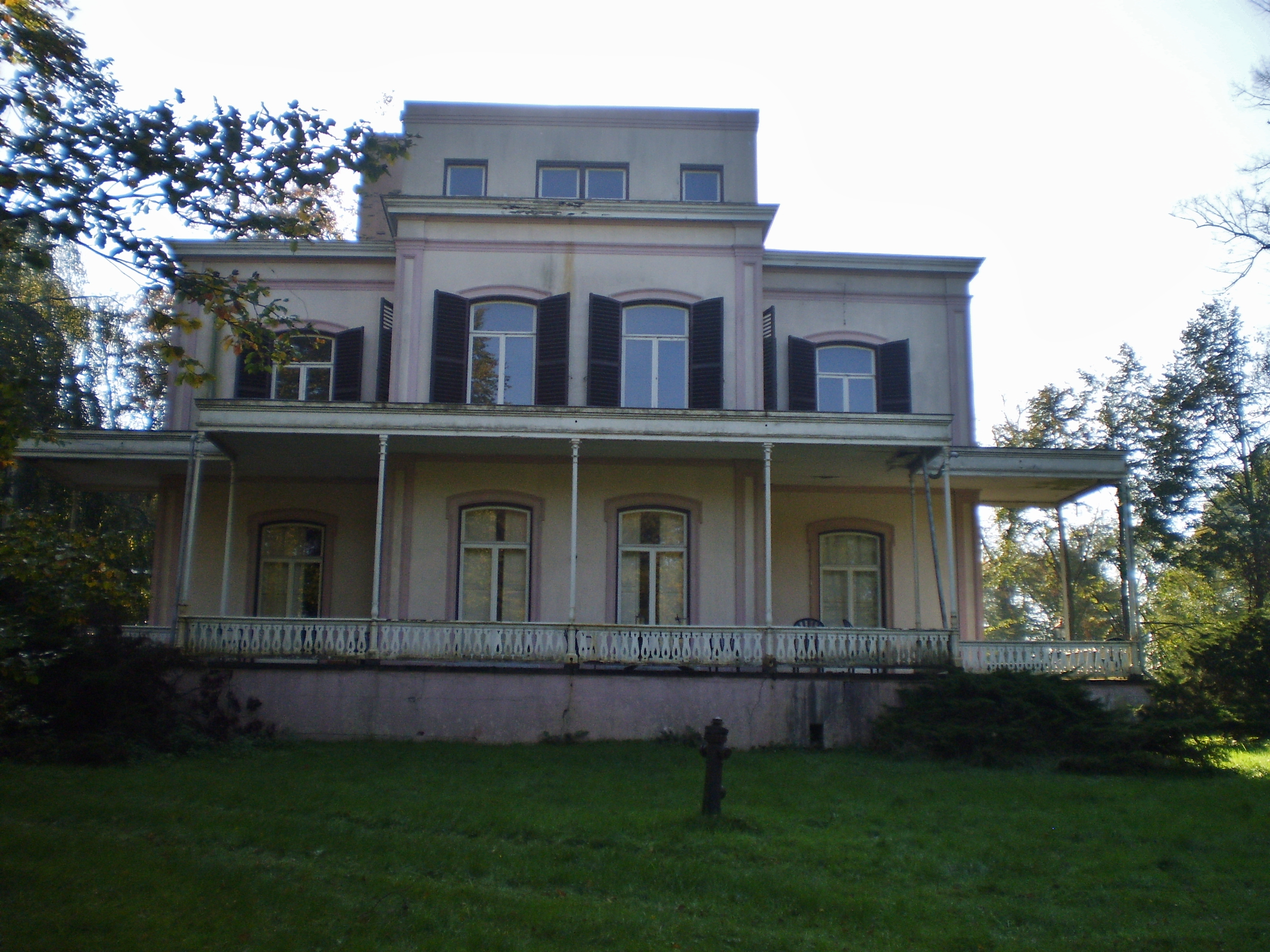 De Palts, vervallen gebouw in oktober 2011